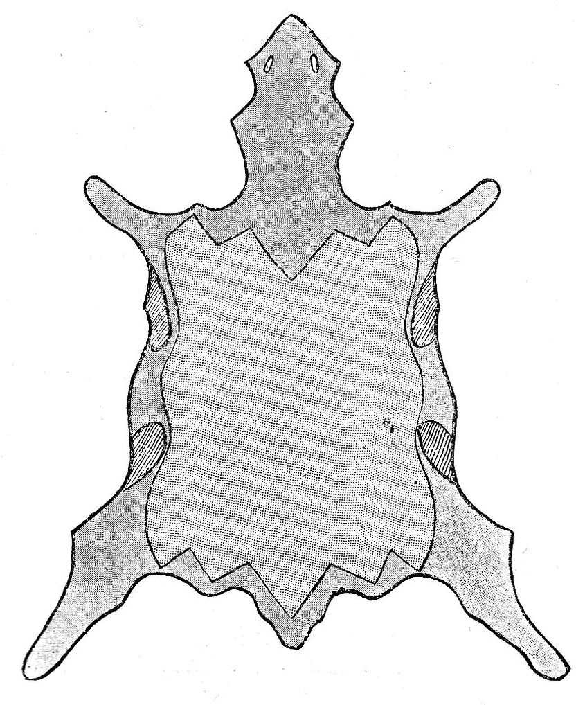 Breitschwanz-Verarbeitung (Bildausschnitt). Bei der Verarbeitung von Breitschwanzfellen ist ein gutes Sortiment die erste Vorbedingung. In den Rücken des herzustellenden Gegenstandes sind Felle zu wählen, die einen gradlaufenden Krotzen haben. Die stärkeren Felle werden nach oben gestellt, um den Übergang con Pumpf auf Kopf unsichtbar gestalten zu können. Bei dem Zusammenstellen der Felle, sowie der Seiten, als Quernäthe, sind gradlaufende Näthe möglichst zu vermeiden und die Zeichnung und Haarschlag auf das sorgfältigste zu beobachten. Auch vermeidet man soviel als möglich Quernäthe gegenüber zu stellen. Auf diese Seite versucht man die Verbindungsnäthe zu verbergen. Die nebenstehende Zeichnung zeigt das Princip der Zusammenstellung von Breitschwänzen zu einer grösseren Fläche. Fig. A. giebt an wie das Fell gewöhnlich abgeschlagen wird. Fig. B zeigt mehrere Felle zu einem Damenkleide zusammengesetzt. Bei der Verarbeitung ist es immer notwendig die Felle mit der Haarseite nach oben, vor sich auf den Werktisch zu halten und jedes Fell nach seiner Eigenart zu schneiden.. Breitschwanz wird im Strich Kopf nach oben verarbeitet. Ein Versetzen der Felle ist zu verwerfen. Bei der Verarbeitung ist Breitschwanz immer mit Vorsicht zu behandeln und jedes unnütze Nassmachen zu vermeiden. Bei dem Zwecken von Breitschwanzsachen ist wie bei Persianer das Haar nach aussen zu halten. Wegen des oft sehr dünnen wenig haltbaren Leders ist anzuraten dasselbe mit Stoff zu beheften und alle Näthe möglichst mit der Hand machen zu lassen. Die abfallenden Köpfe und Klauen werden zu besonderen Tafeln zusammengestellt. Die Klauen gewöhnlich schräg in Zickzackform.